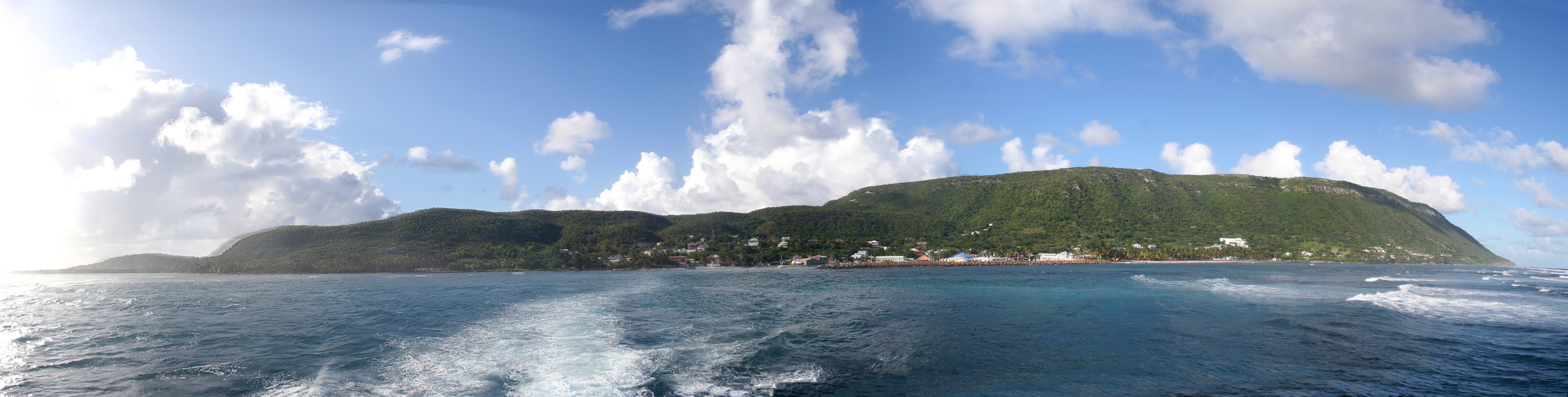 La Désirade, photo prise lors du voyage retour vers St François